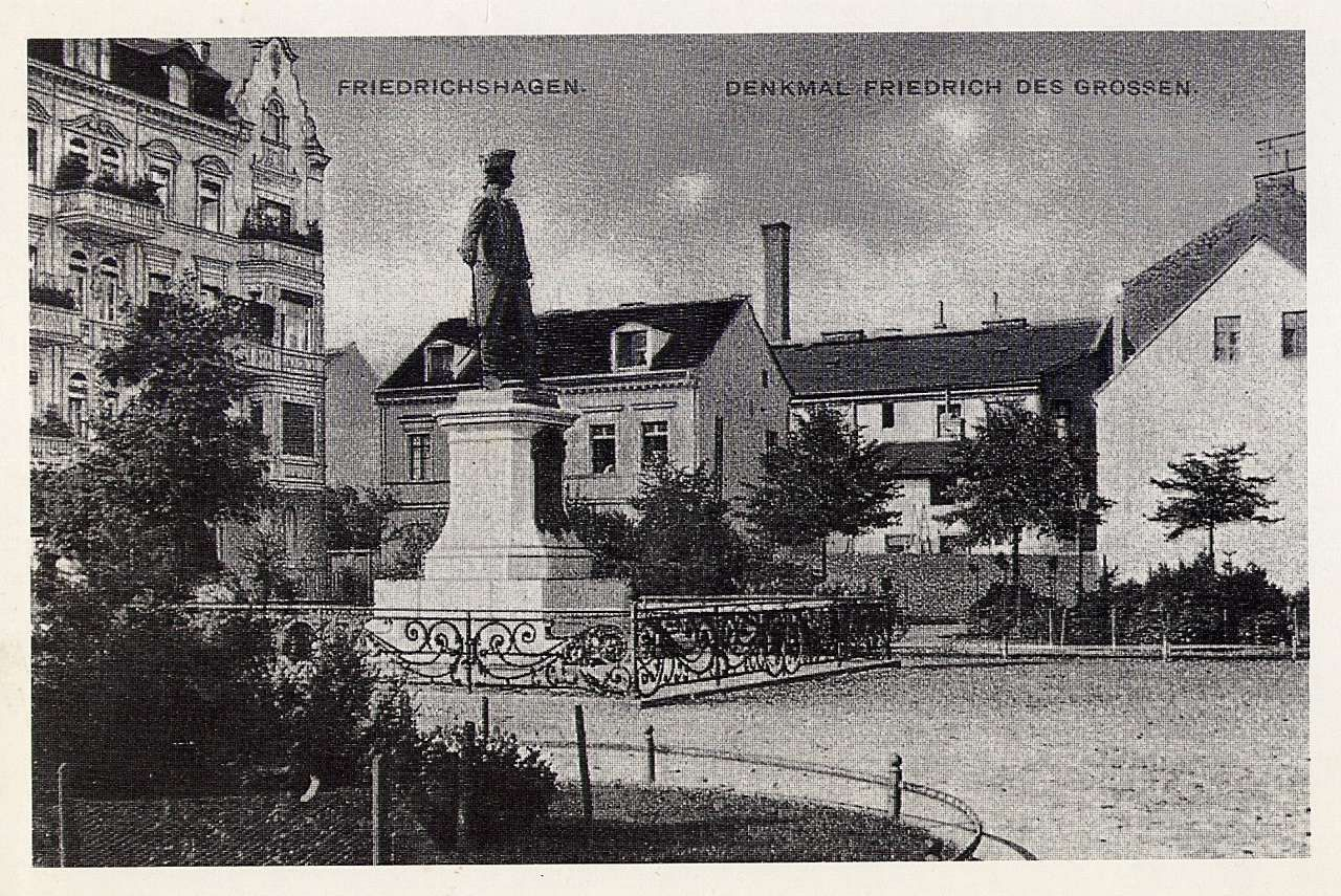 Felix Goerling